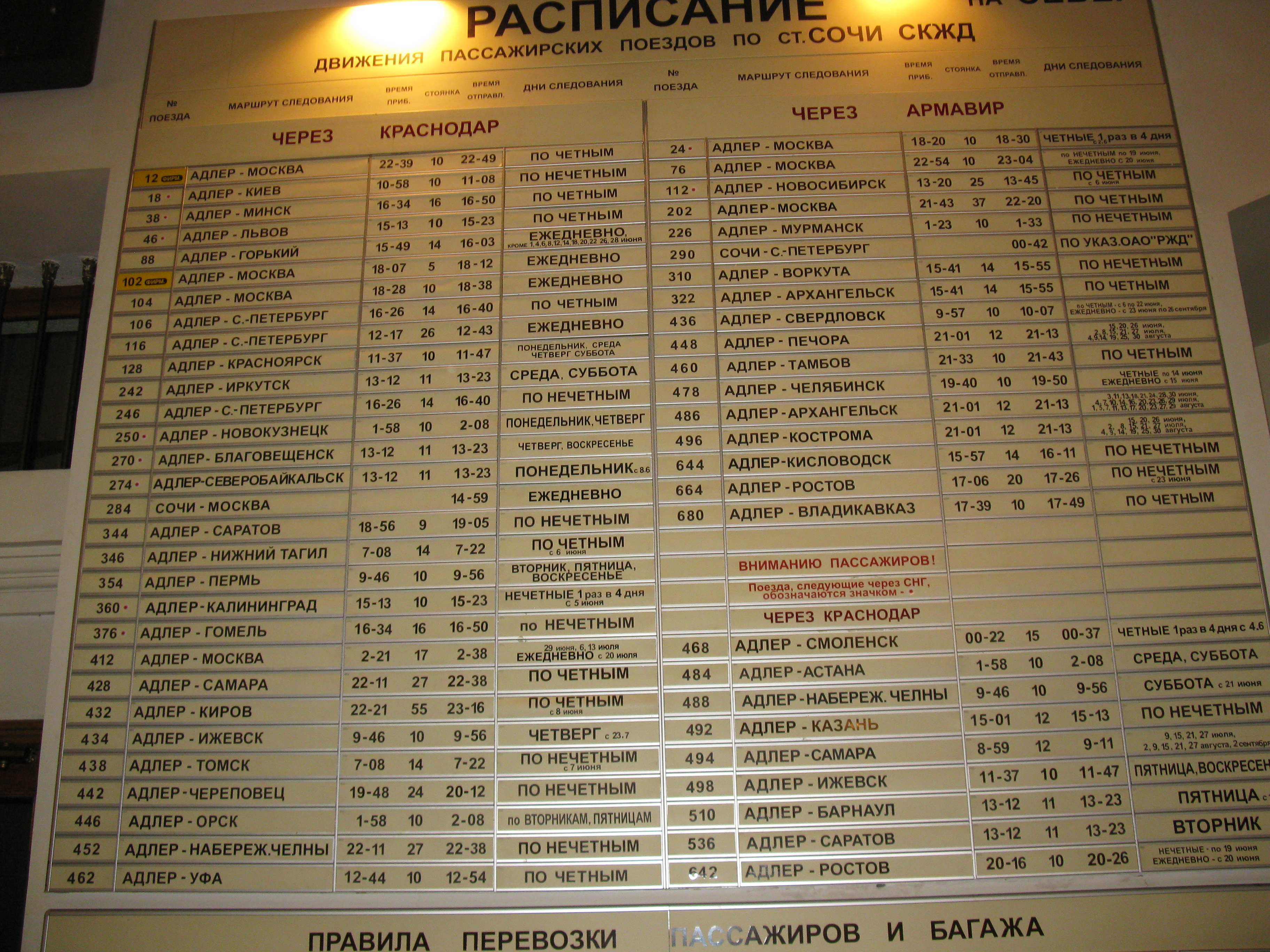 Сочи (станция)